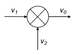 Simbolo electronico de un mezclador multiplicador